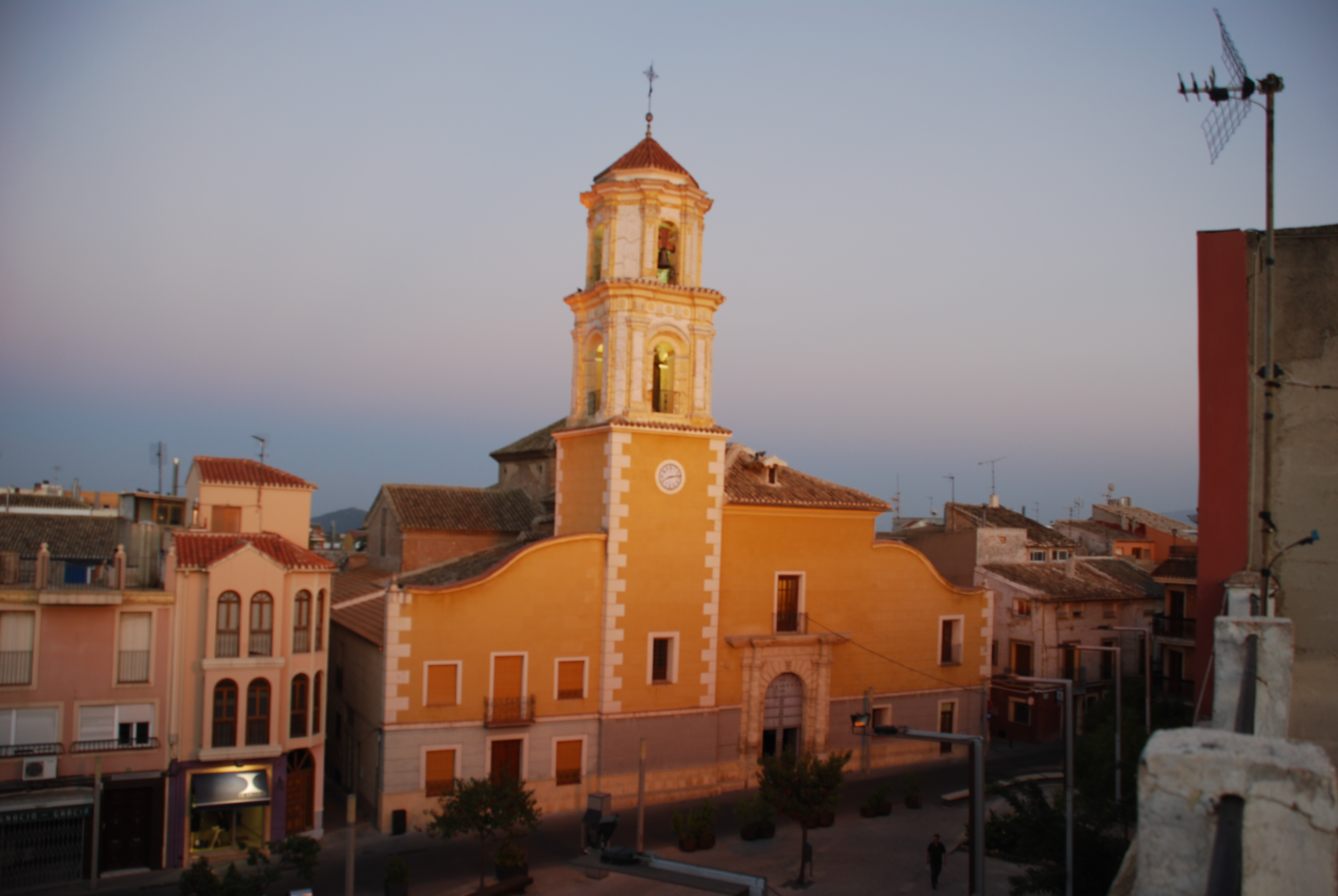 Iglesia Parroquial de Nuestra Señora del Rosario (Bullas) (Bullas, ID: RI-51-0004583)